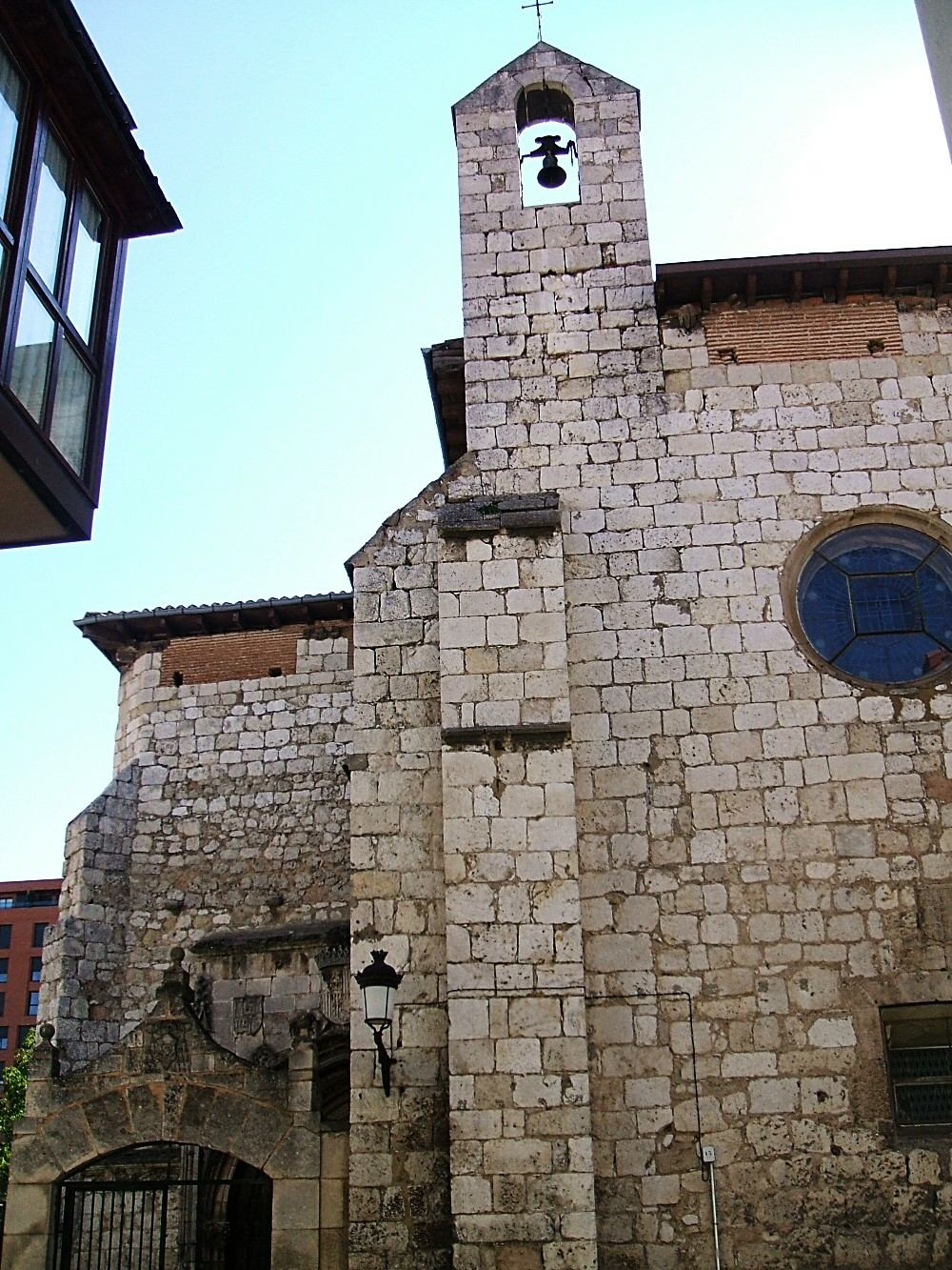 Convento de Santa Dorotea, de MM Canónigas Agustinas, Burgos, España (siglo XV)